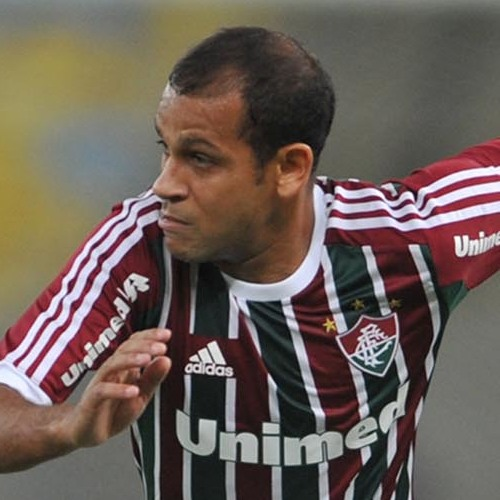 Carlinhos no Fluminense